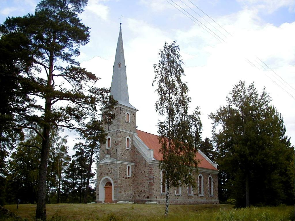 Mazirbes baznīca 2000-06-24